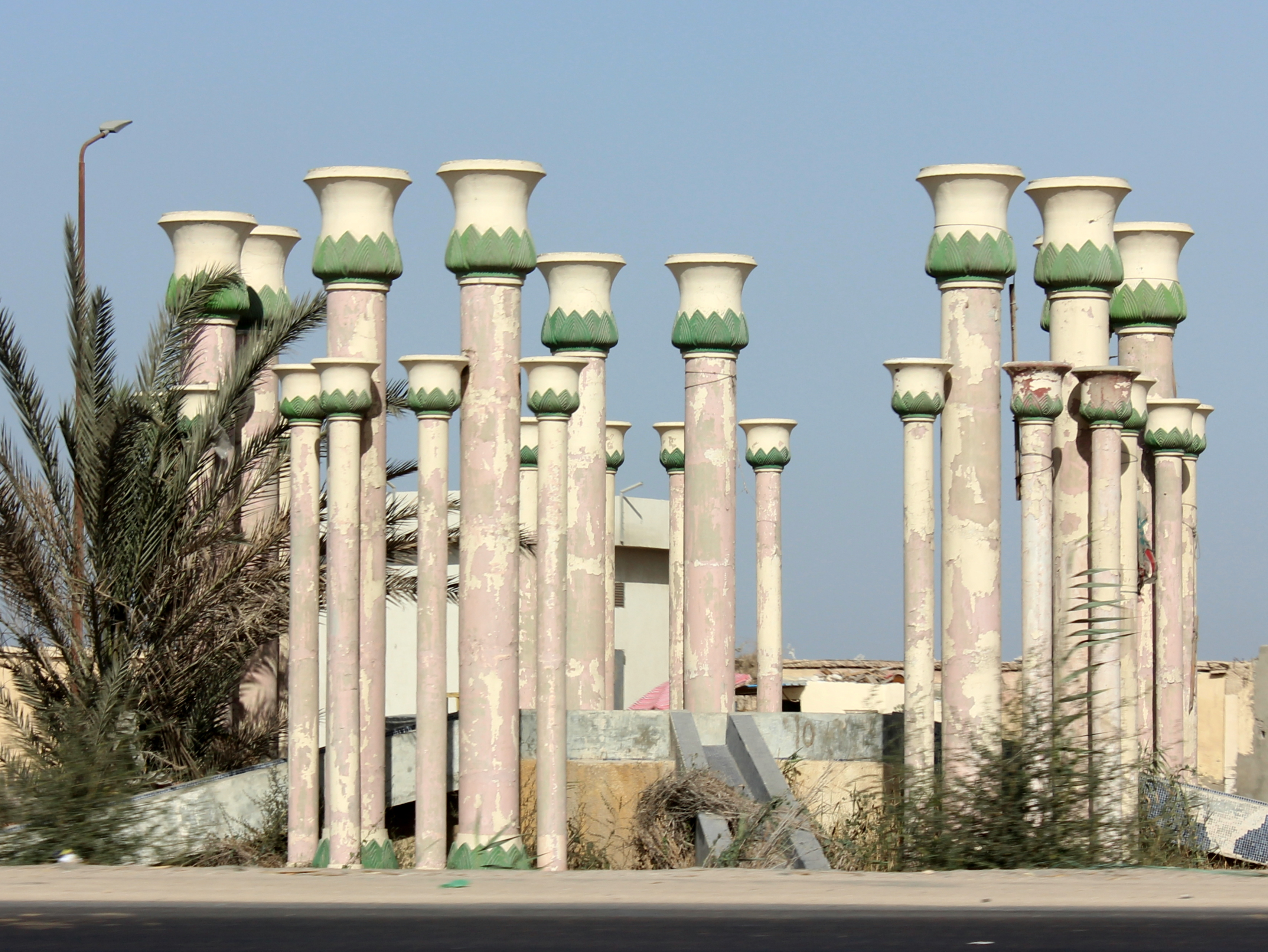 أحد الآثار بمنطقة العجمي، مصر.